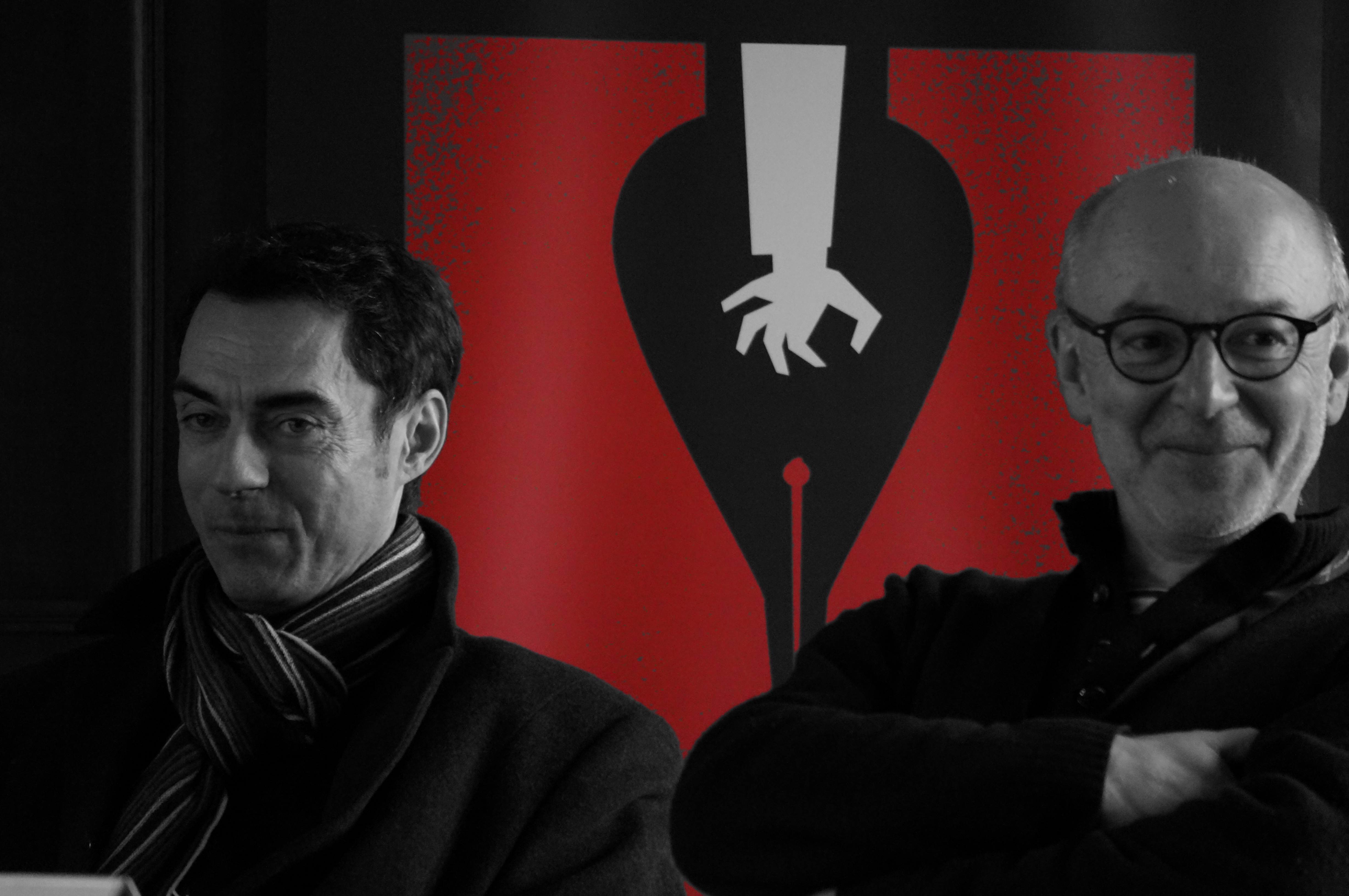 Lors du 8e festival Interpol'art .